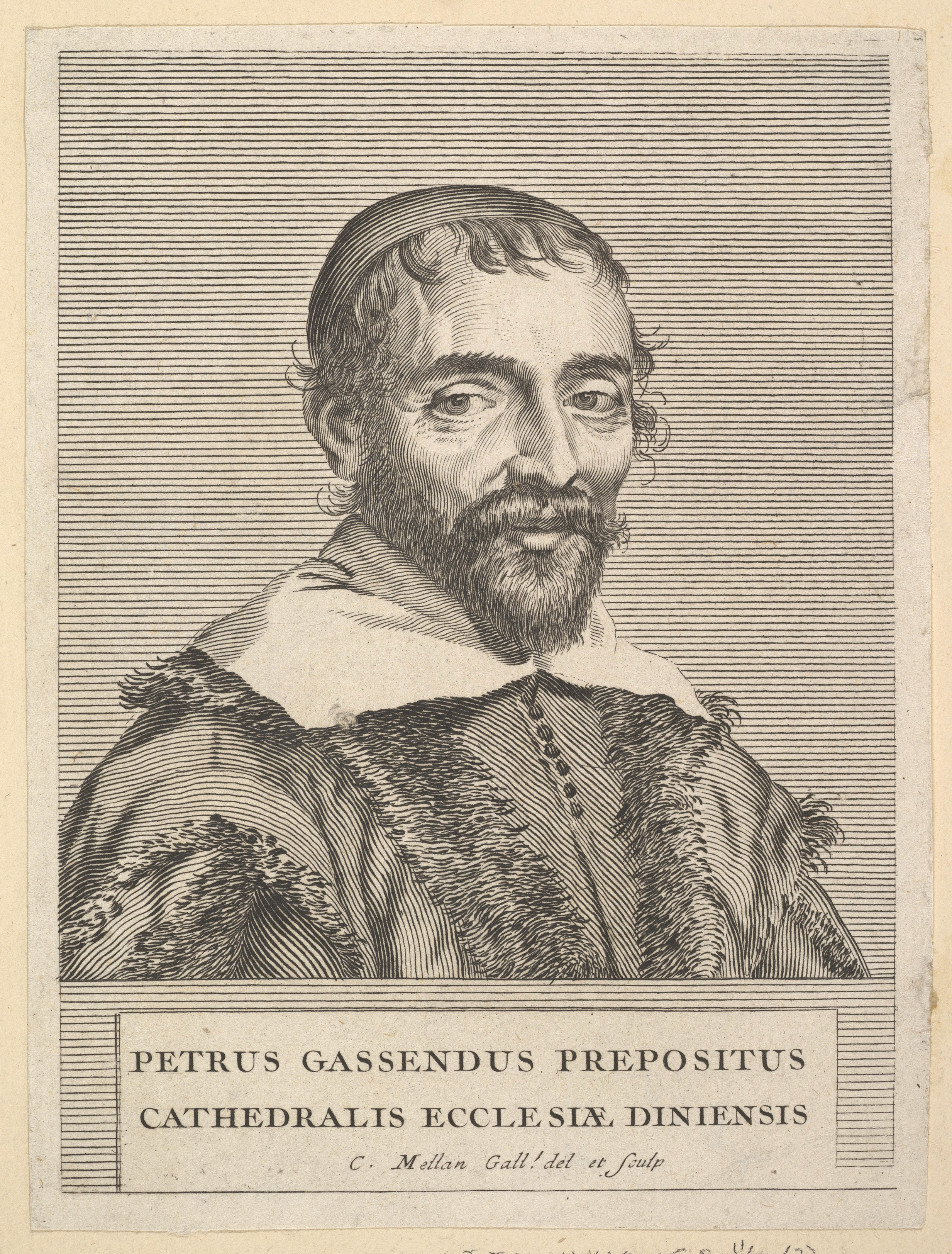 Gravure d'Odieuvre d'après celle de Mellan